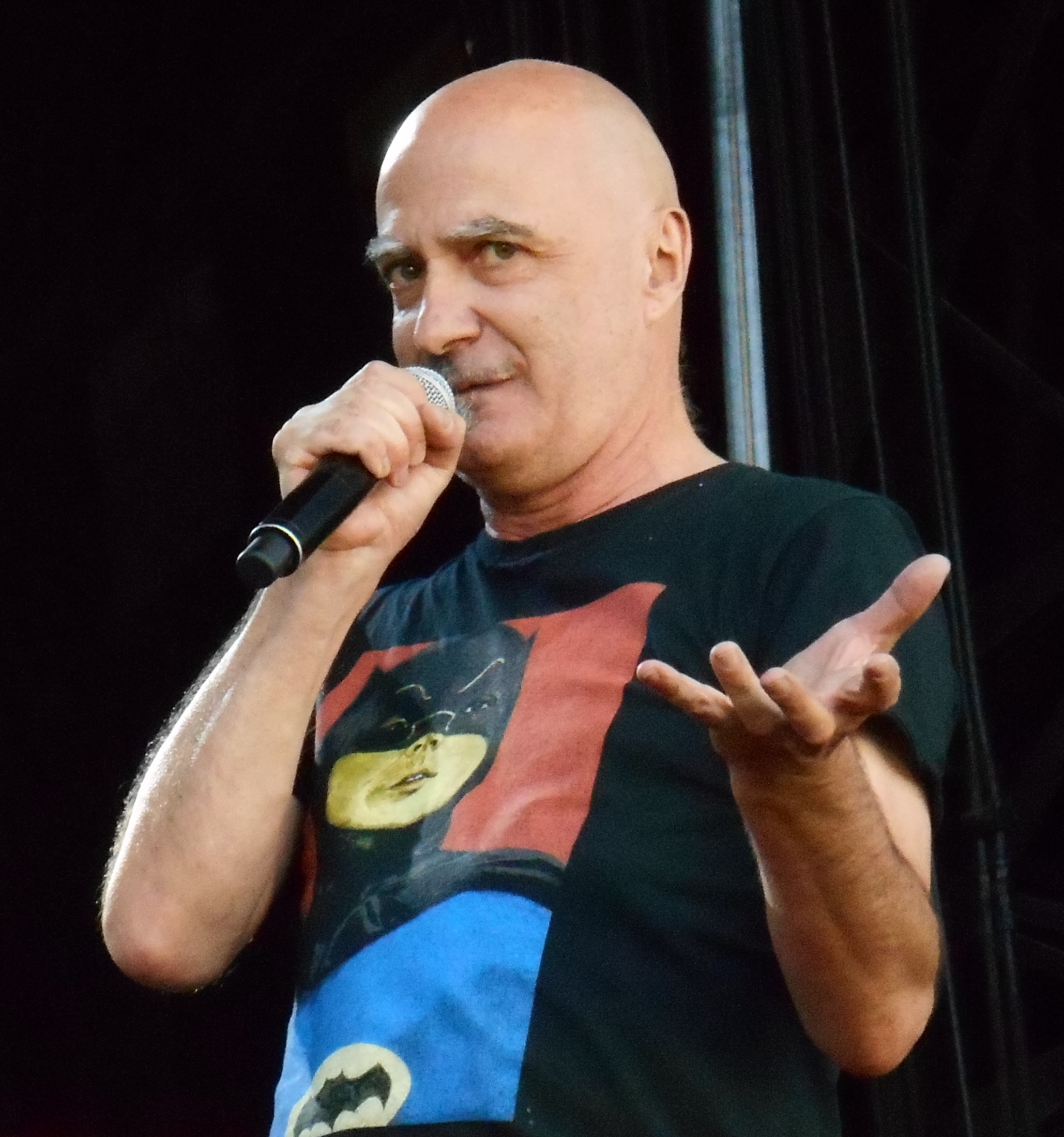 Michel Faubert Répétition du spectacle La symphonie rapaillée, offert dans le cadre des FrancoFolies de Montréal, le 22 juin 2014